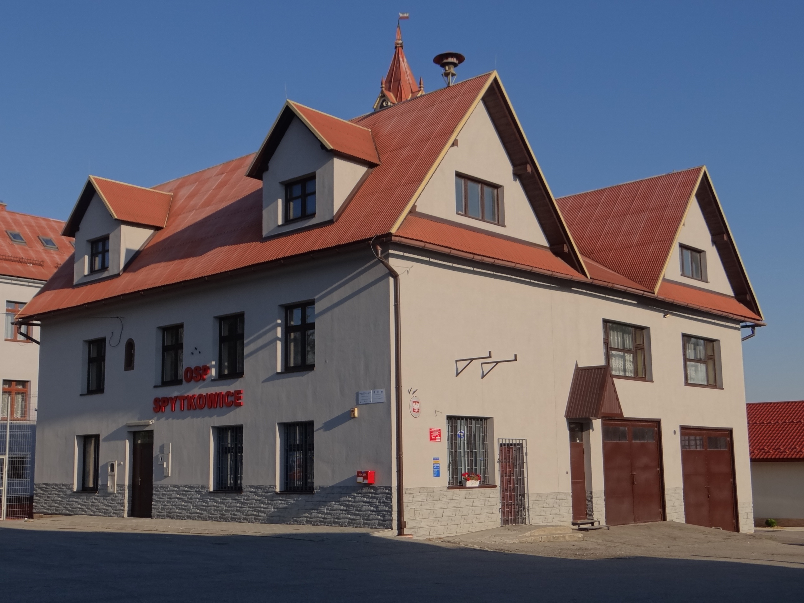 Remiza OSP w Spytkowicach